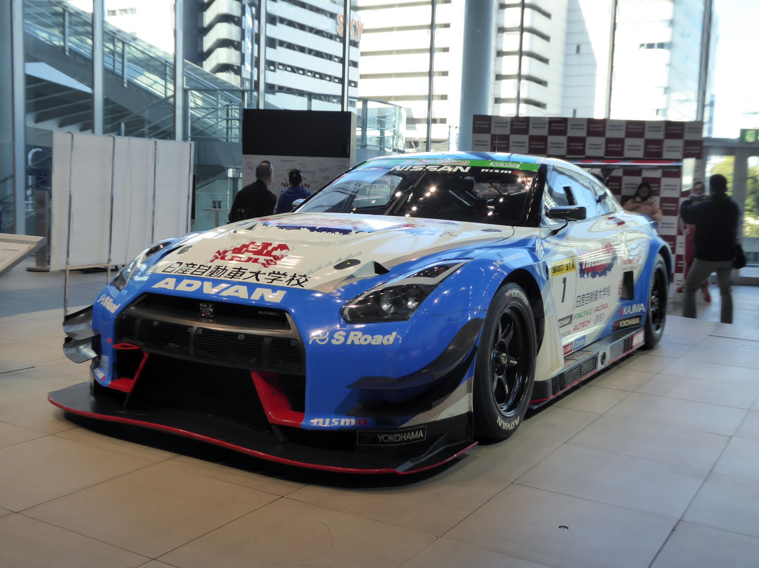 日産グローバル本社ギャラリーにて2017年スーパー耐久仕様の1号車スリーボンド日産自動車大学校GT-Rを撮影。